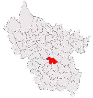 Categorie:Hărţi ale judeţului Buzău